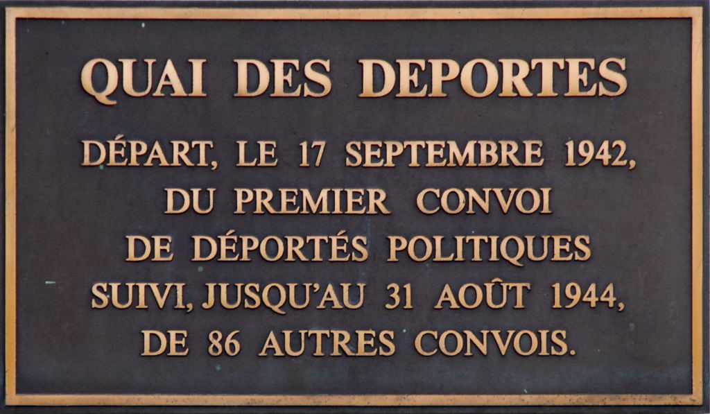 Erënnerungsplakk um fréire Gare-Gebai op der Gare zu Lëtzebuerg-Hollerech.